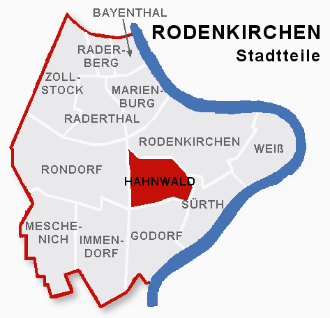 Lage des Stadtteils Hahnwald im Stadtbezik Rodenkirchen